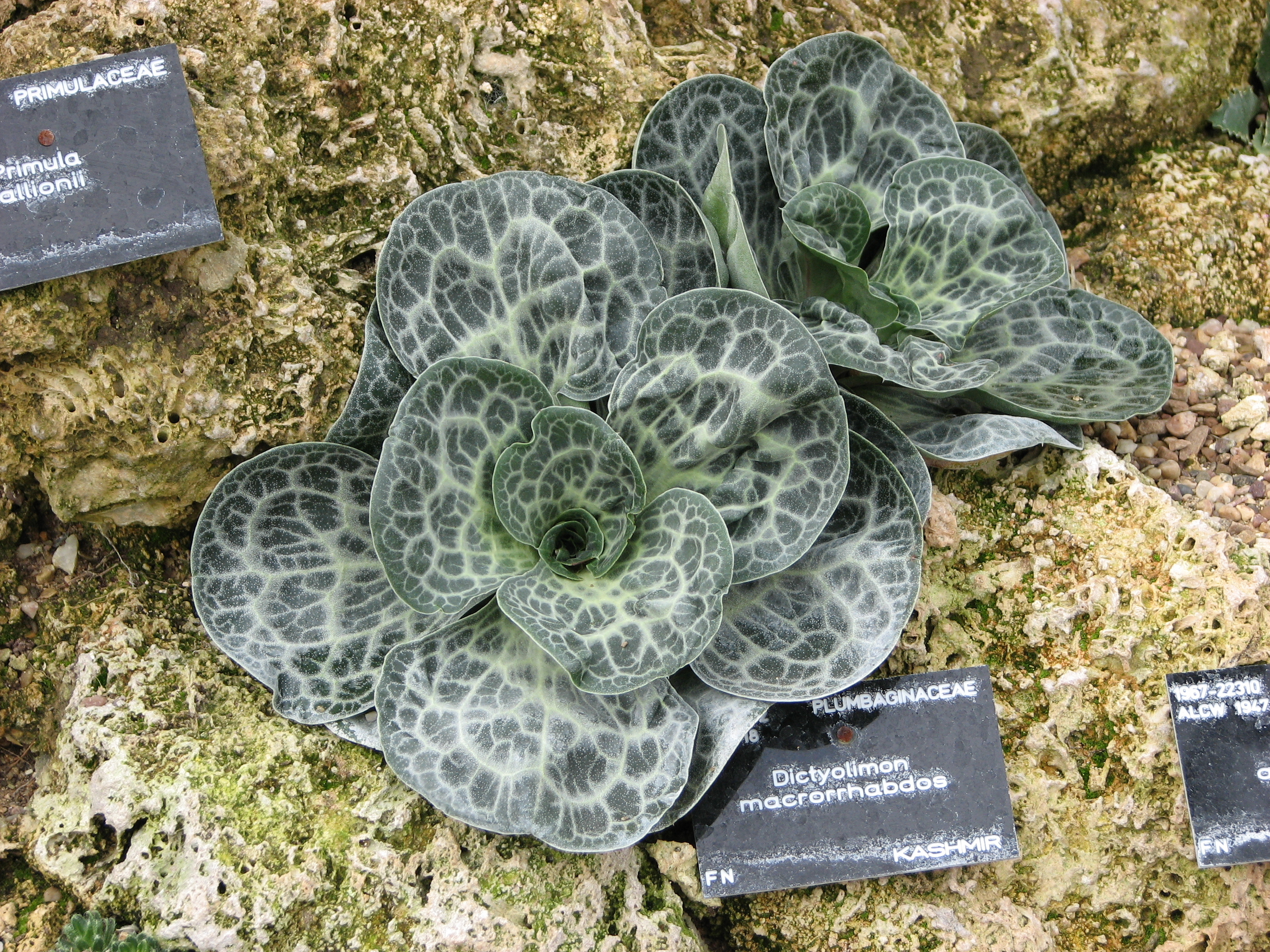 Kew Gardens - London - September 2008